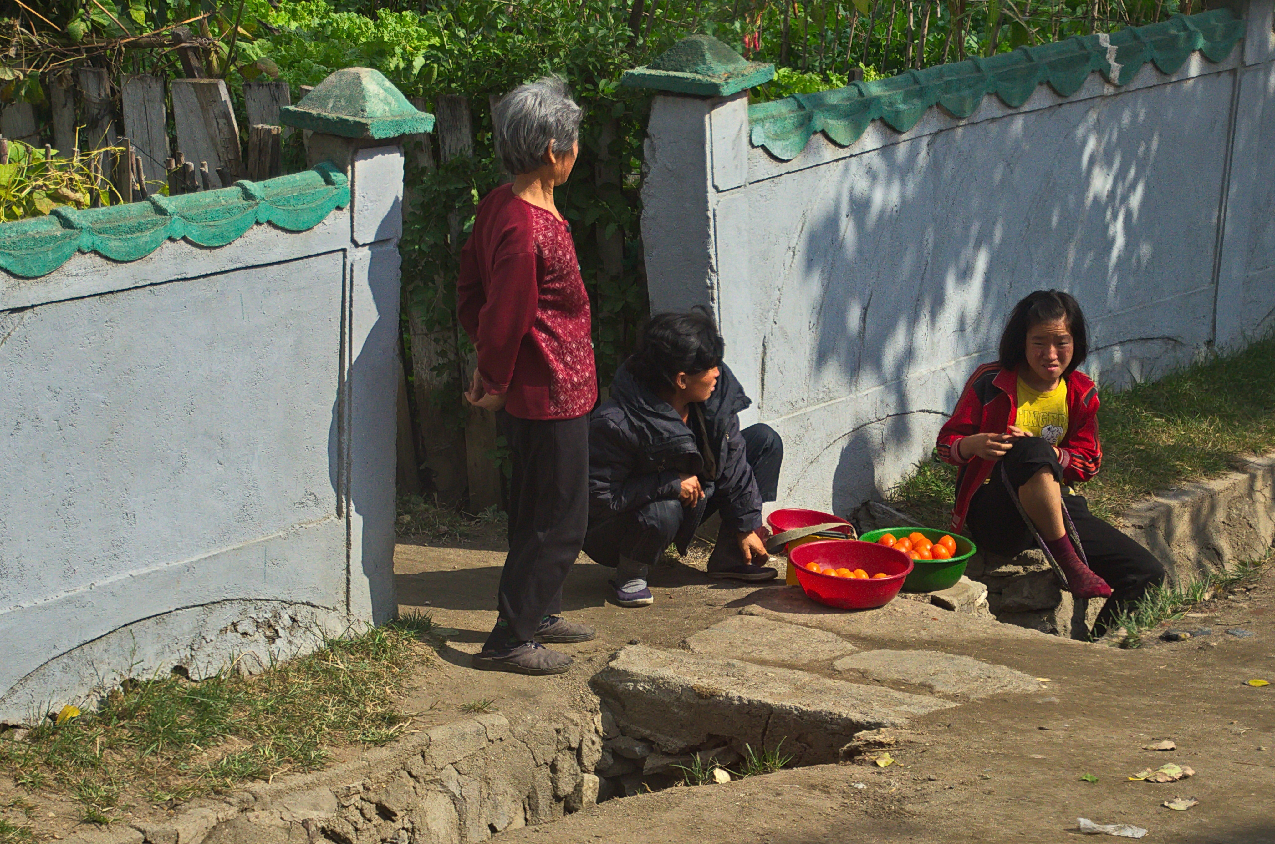 Nordkorea 2015 - von Nampo nach Käsong